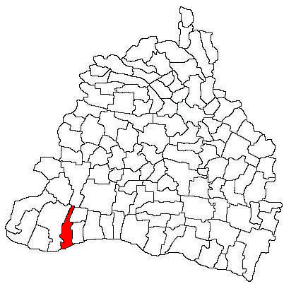 Amplasarea în cadrul județului.